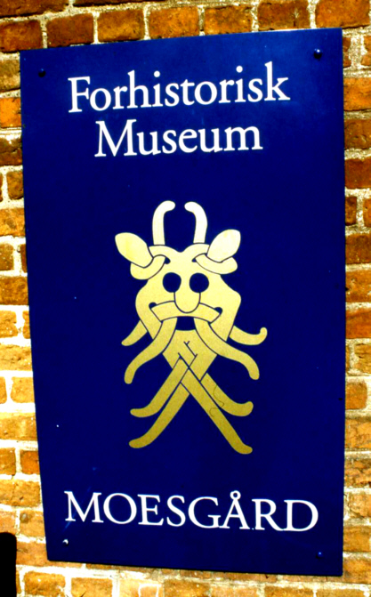 Maskenstein